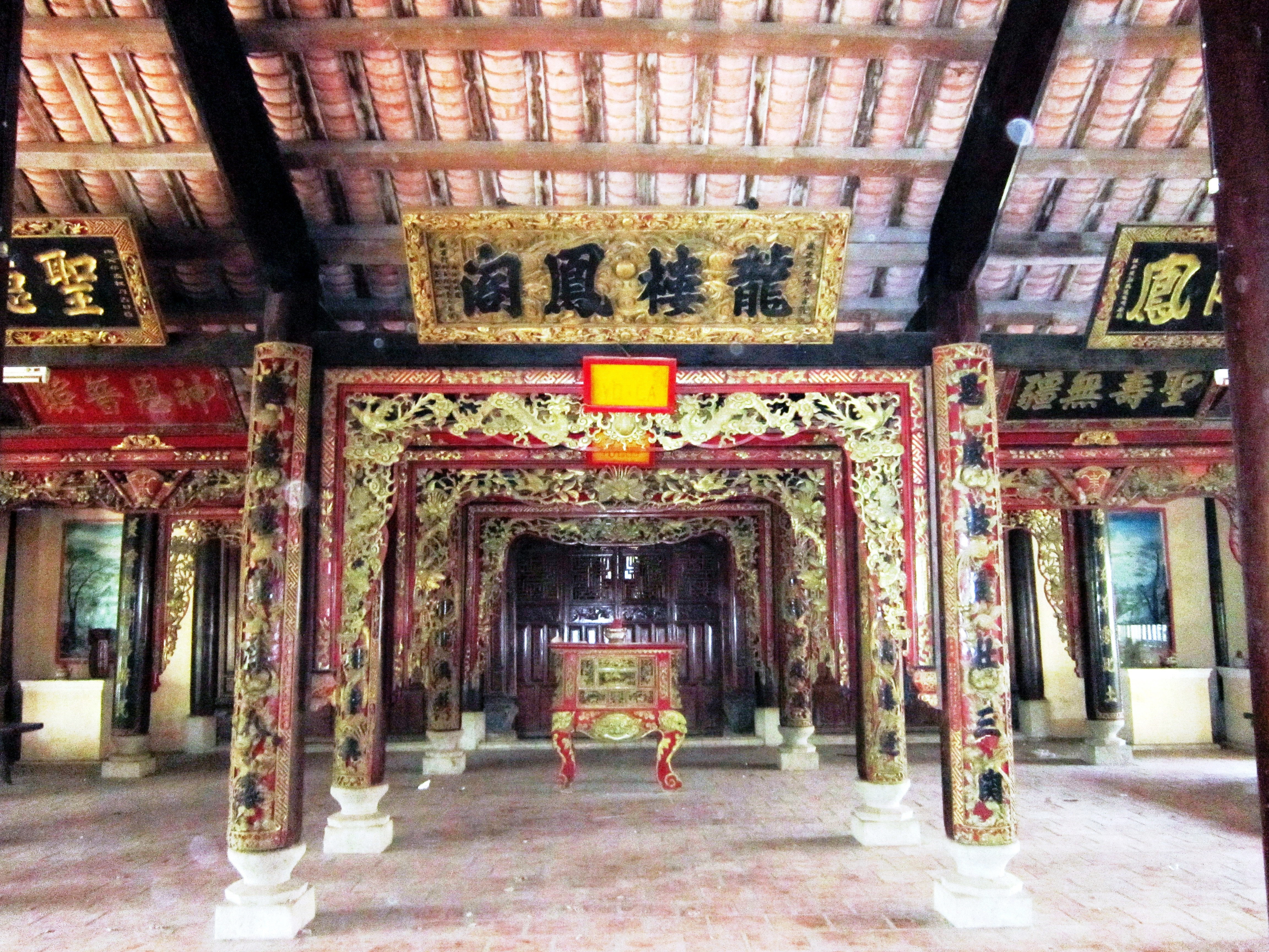 Đình Tân Thạch là một ngôi đình cổ; hiện tọa lạc tại ấp 9, xã Tân Thạch, huyện Châu Thành, tỉnh Bến Tre, Việt Nam.